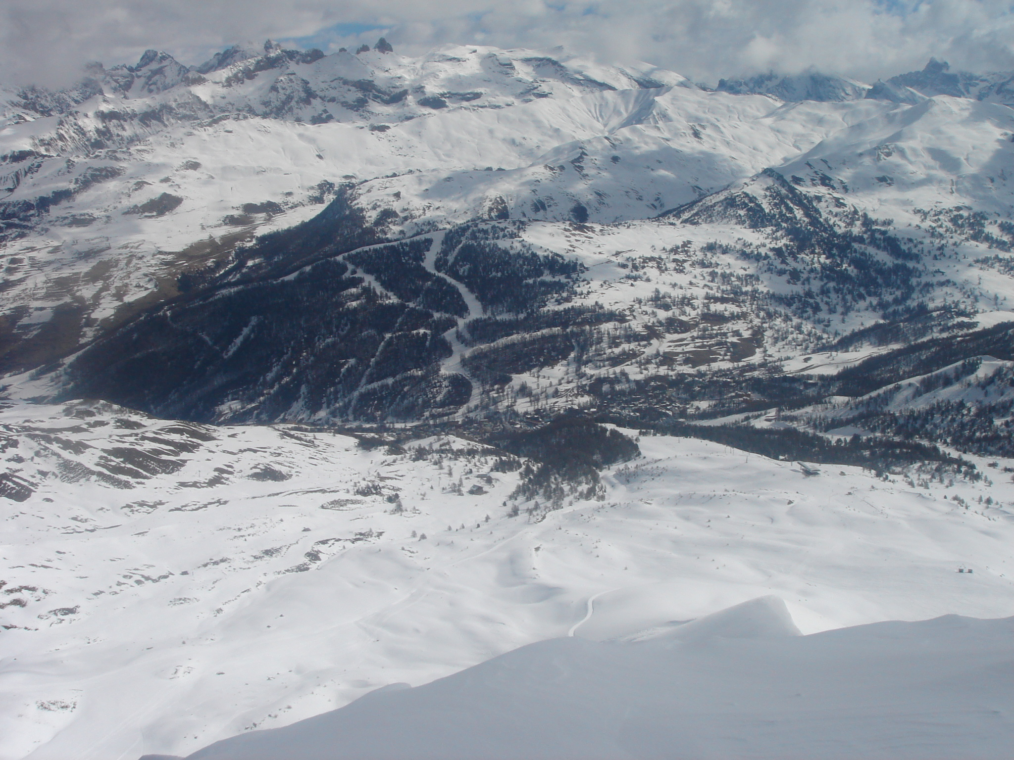 Vars depuis le pic de Chabrieres